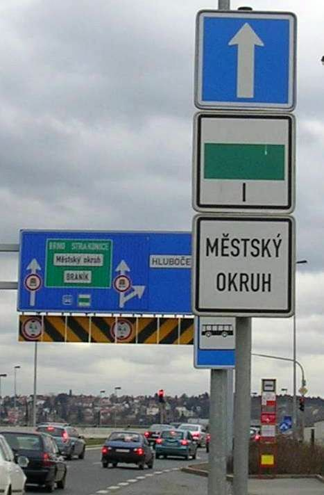 Praha, Smíchov, Dobříšská ulice za křižovatkou s Radlickou, označení Městského okruhu